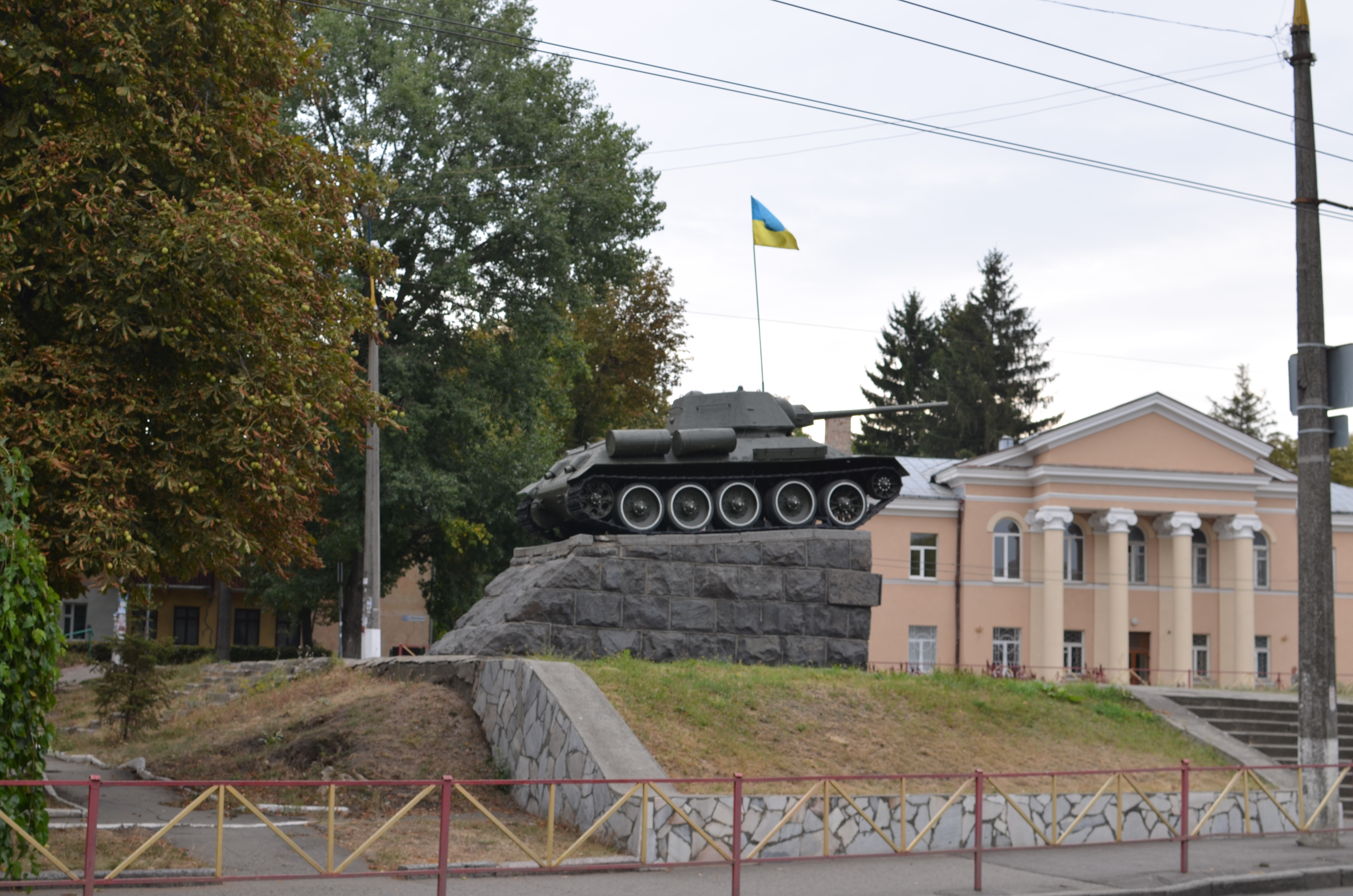 Пам'ятка архітектури 1967 року. Вулиця Кам'янецька, 111. Місто Хмельницький.